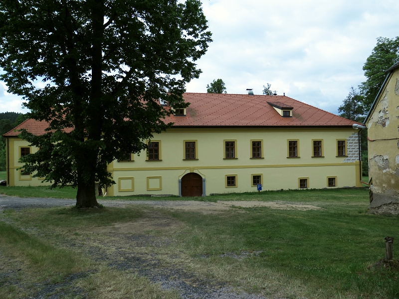 Zámek Obytce, Obytce 1, Obytce.